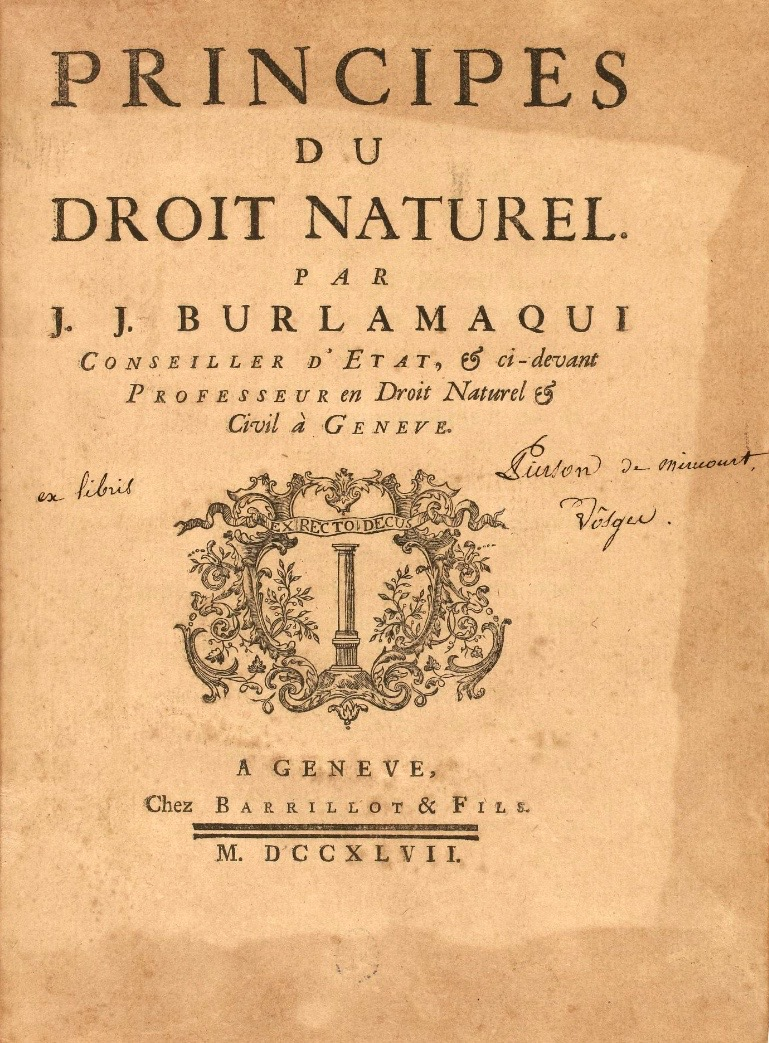 Principes du droit naturel, par Jean-Jacques Burlamaqui, Genève, chez Barrillot & Fils, 1747. Couverture.